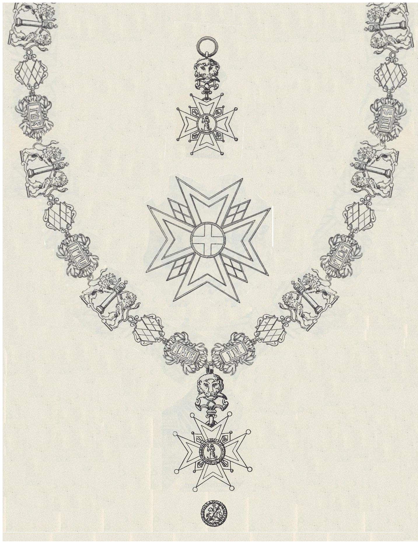 Compositie van tekeningen van Maximilian Gritzner door oplader